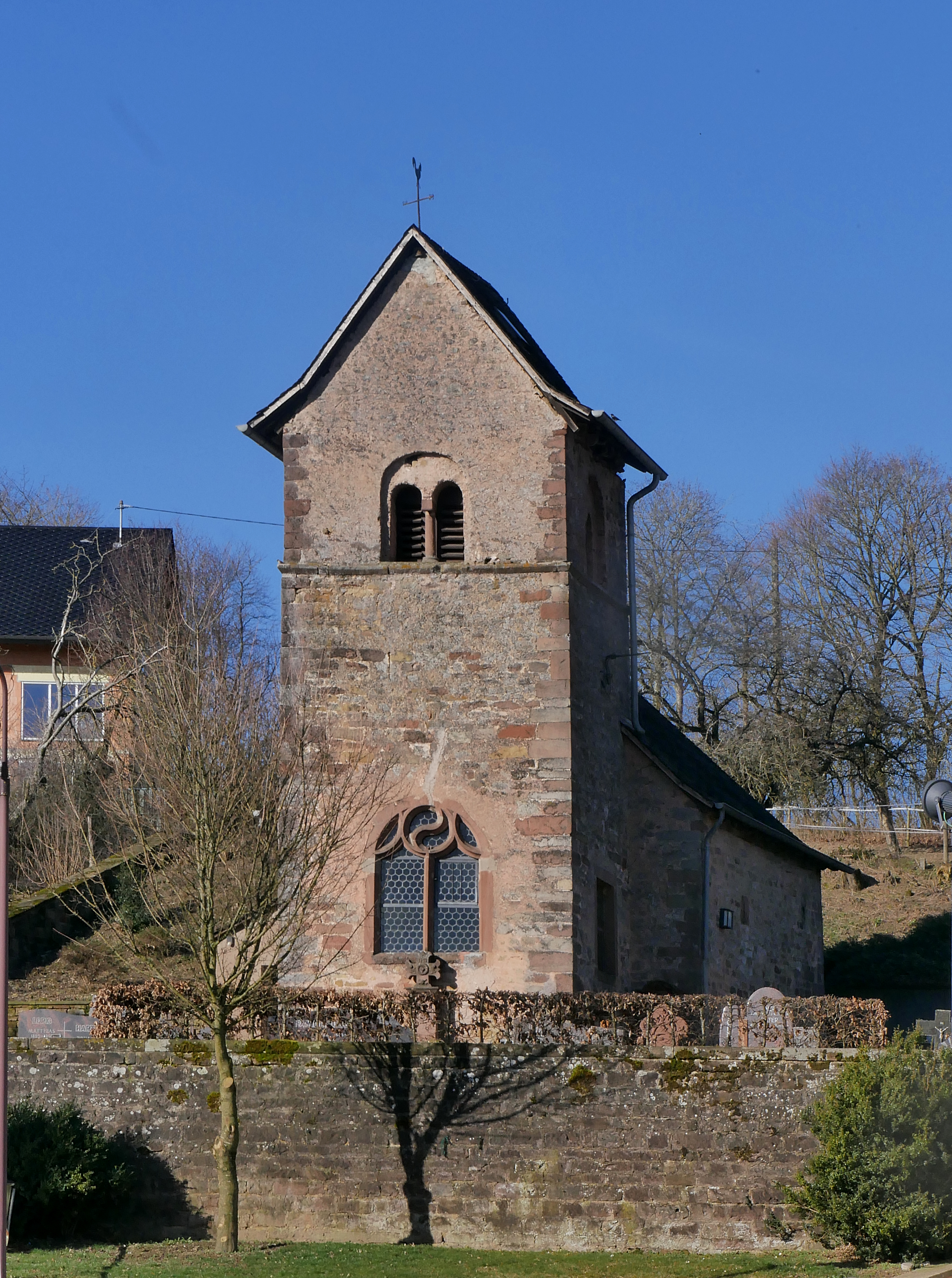 Kirche St. Abriuculus in Besslich (Rheinland-Pfalz, Kreis Trier-Saarburg)